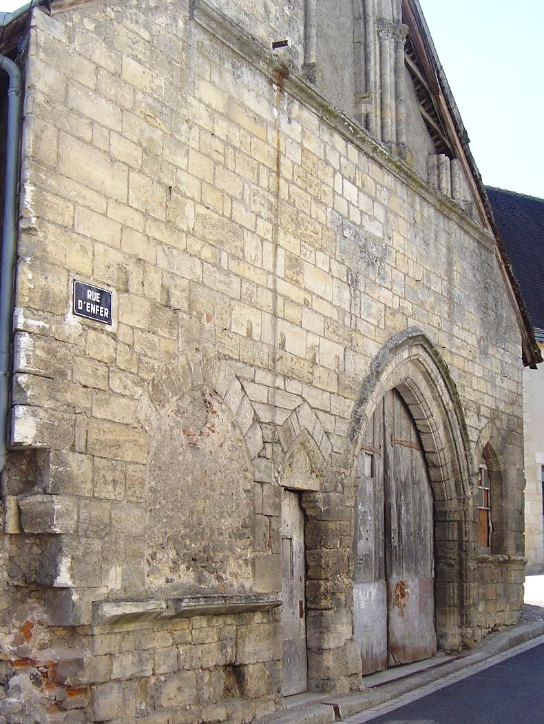 Palais de justice de Limeray, Indre et Loire, France